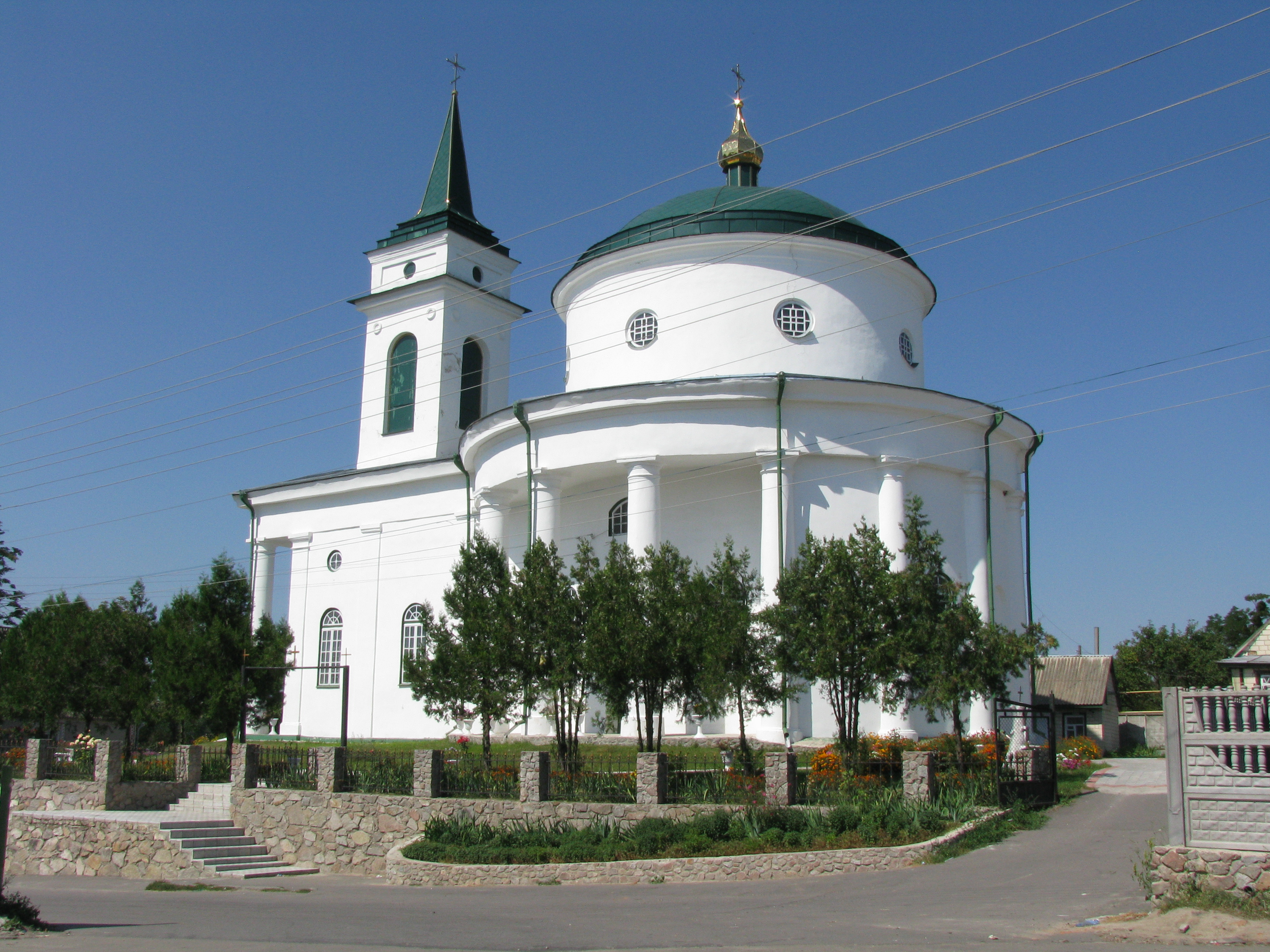 Троїцька церква (мур.), Богуслав, пл. Ринок